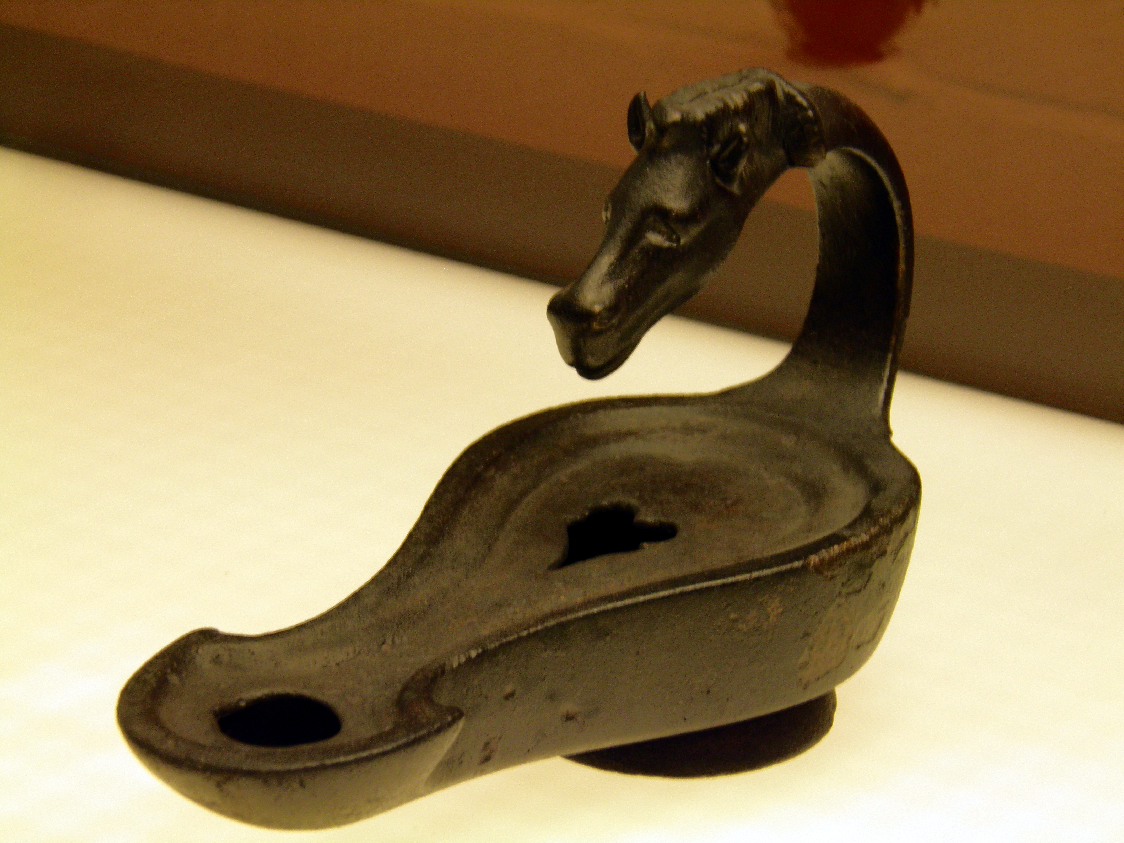 Bronze oil lamp, Romisch-Germanisches Museum, Cologne